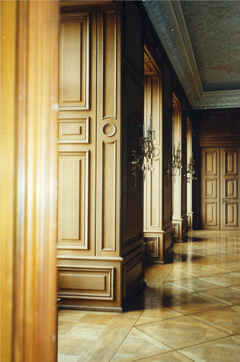 Blick in die Enfilade nach Westen